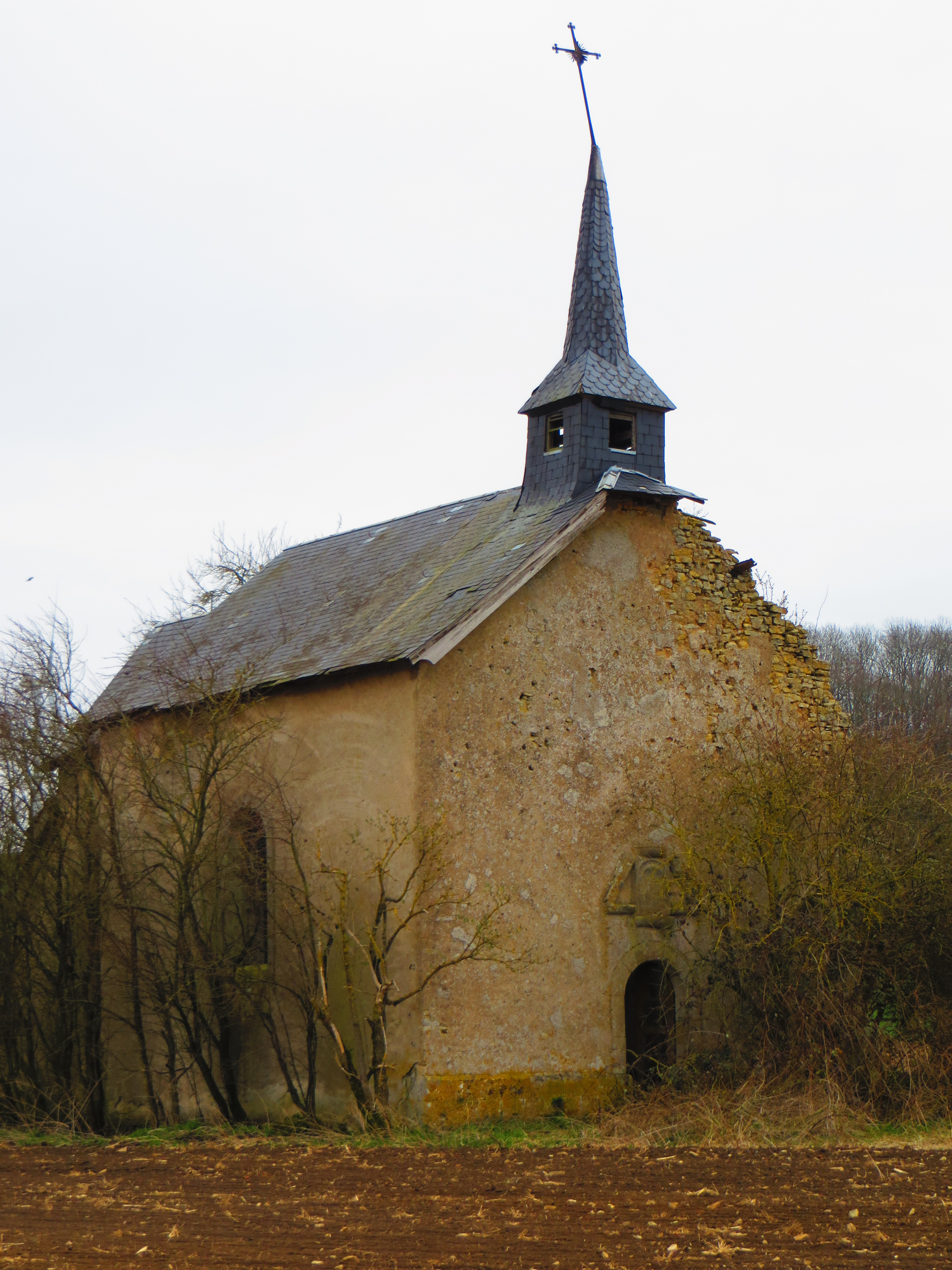 Many Mercourt chapelle